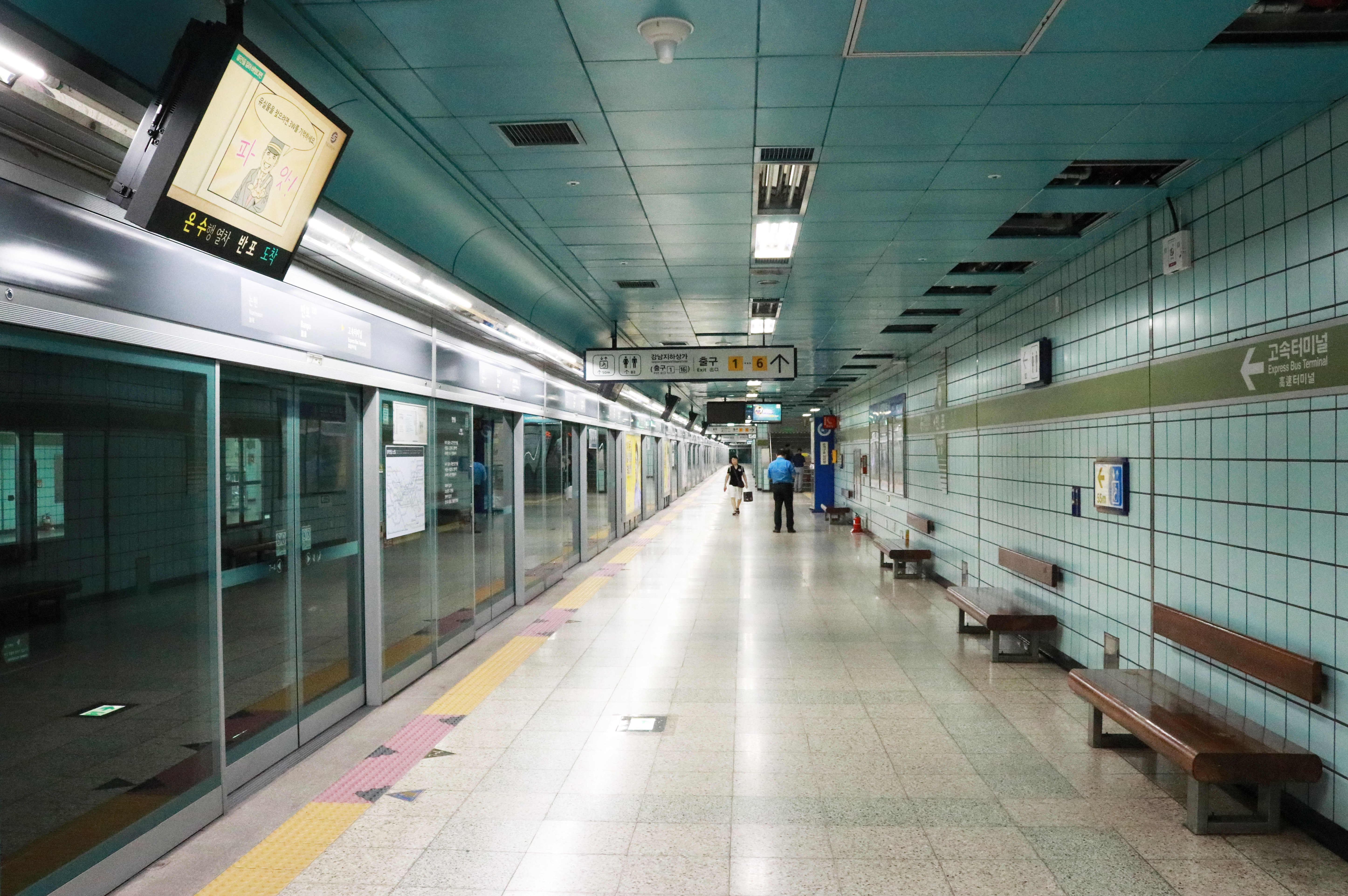 반포역 승강장